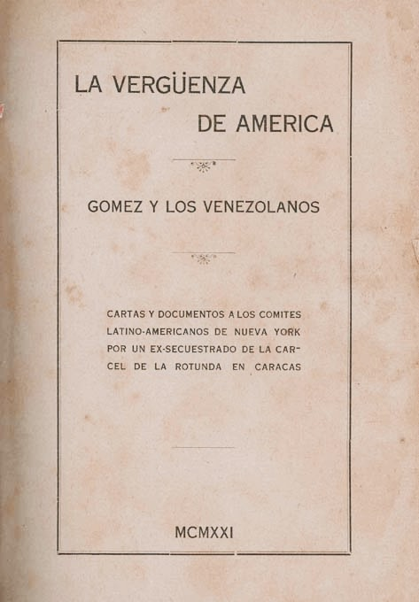 Libro anónimo del periodista venezolano Carlos López Bustamante, publicado durante su exilio en Nueva York.